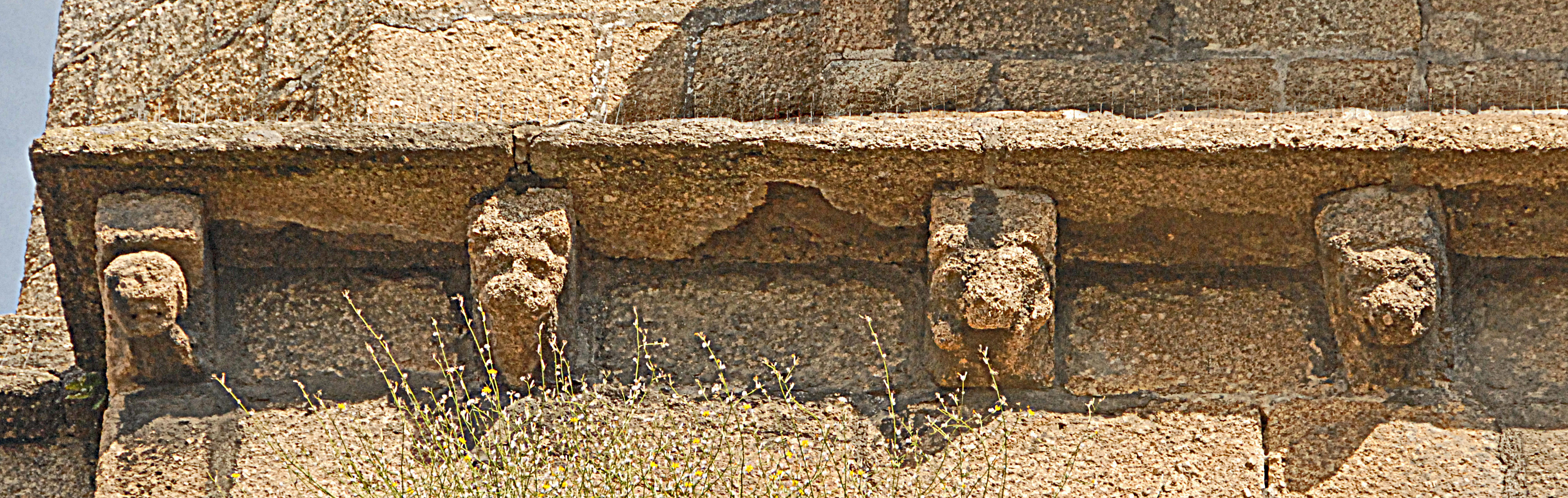 St-Junien, Kragsteine ehem. Traufe, Südwand